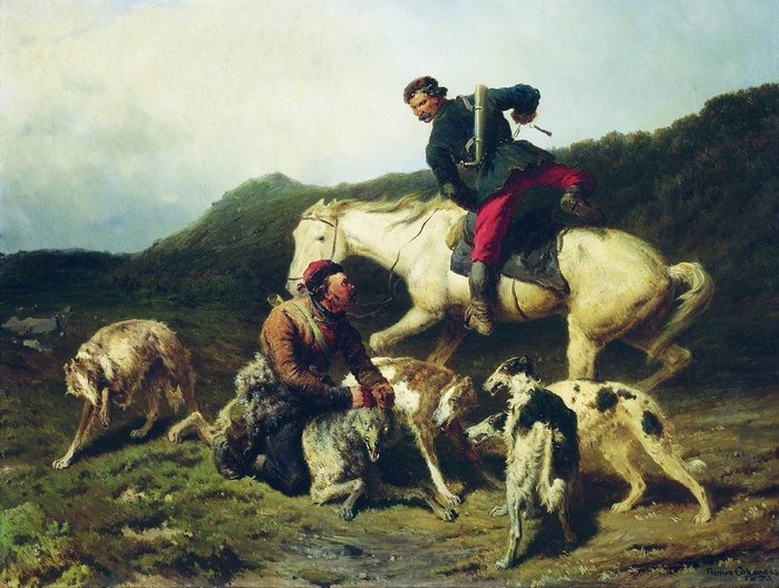 П.П.Соколов. Охота на волка. 1873. Государственная Третьяковская галерея, Москва